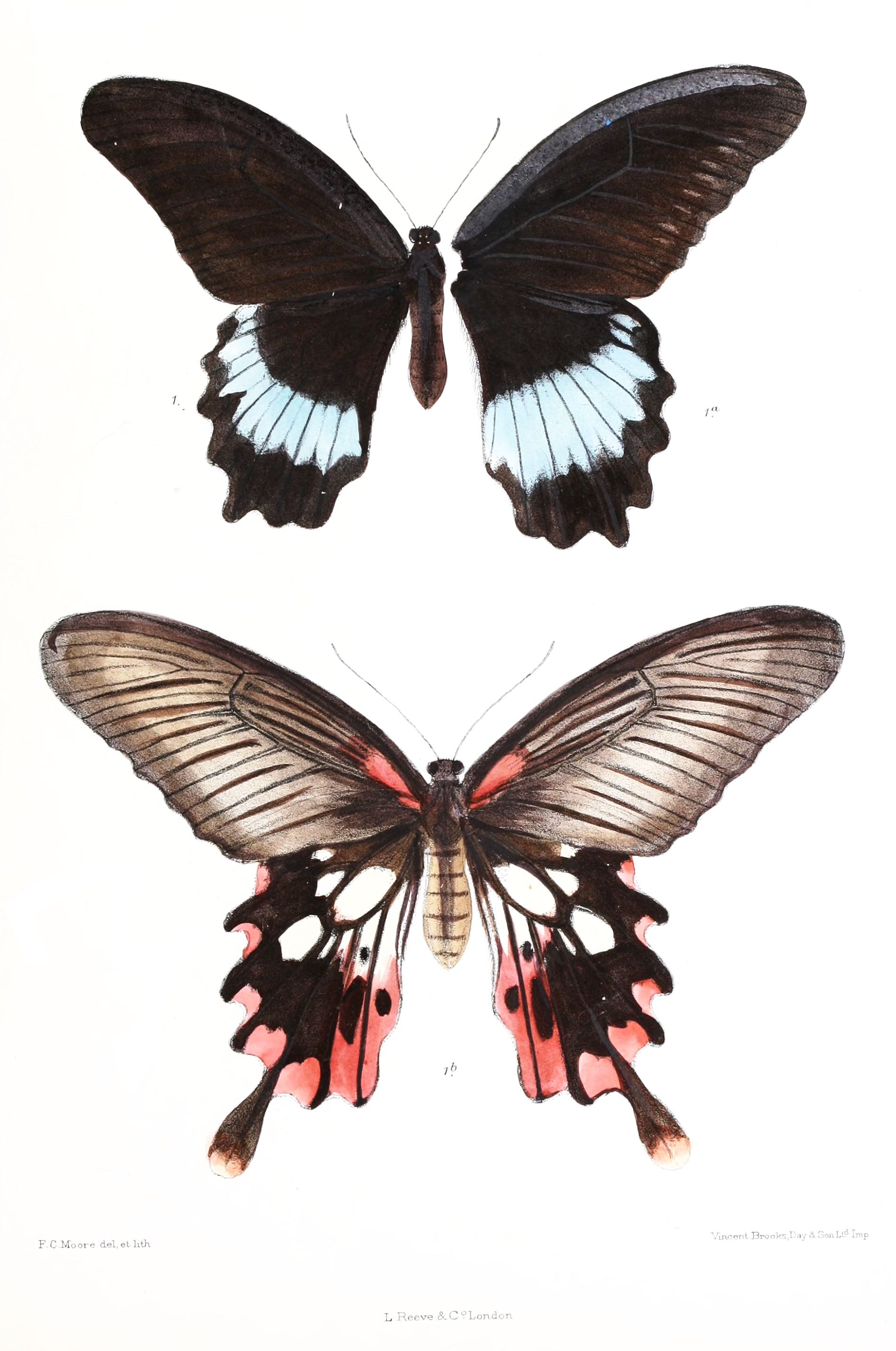 Iliades mayo = Papilio mayo